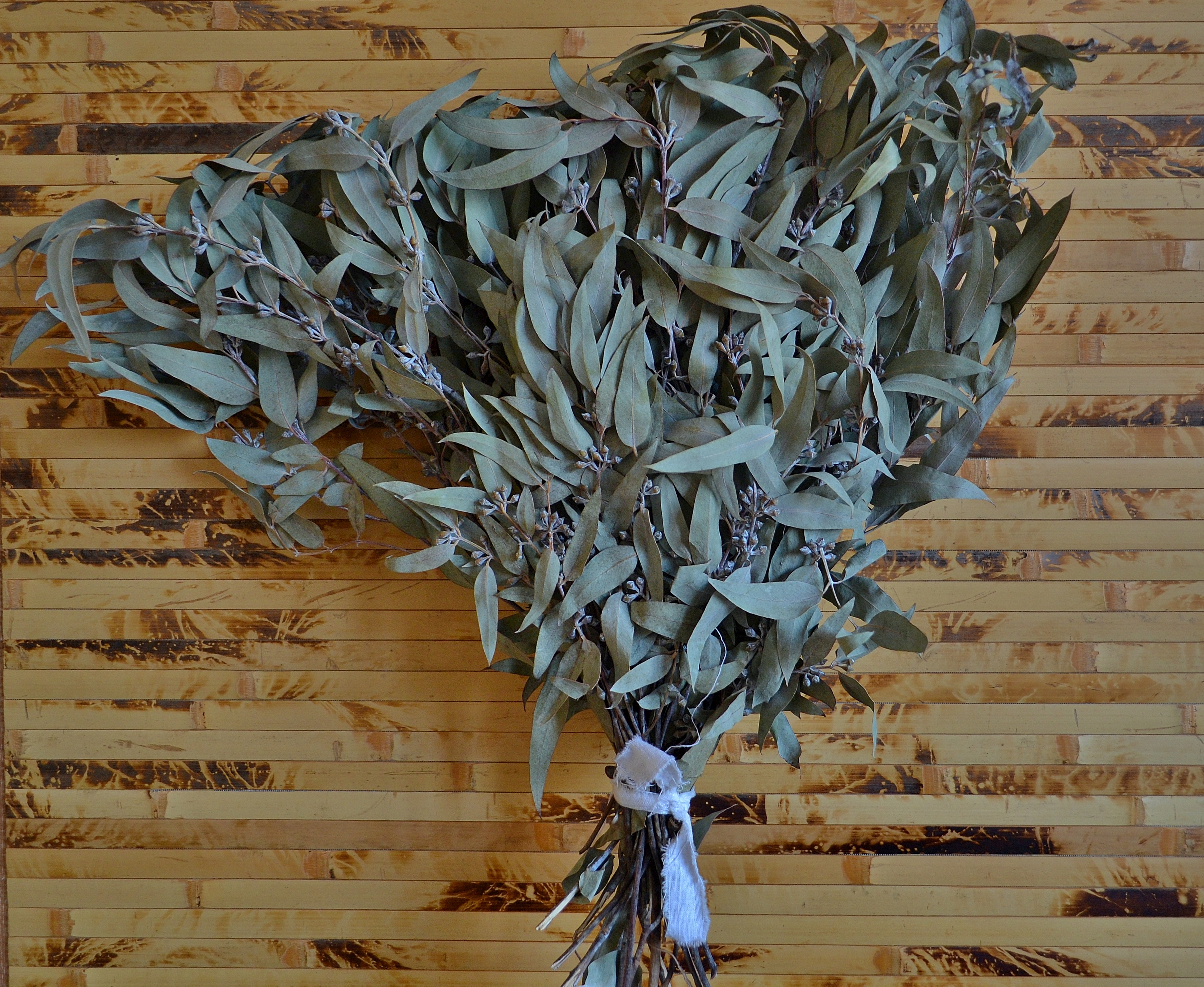 Банный веник из ветвей эвкалипта.